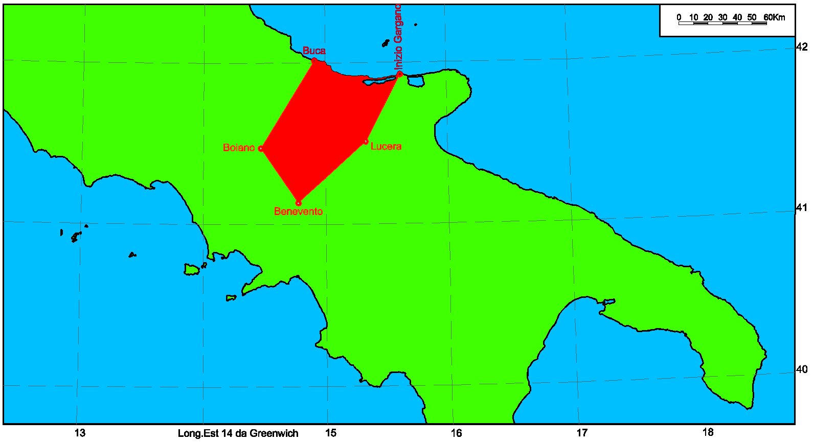 Il territorio degli Apuli propriamente detti di Strabone